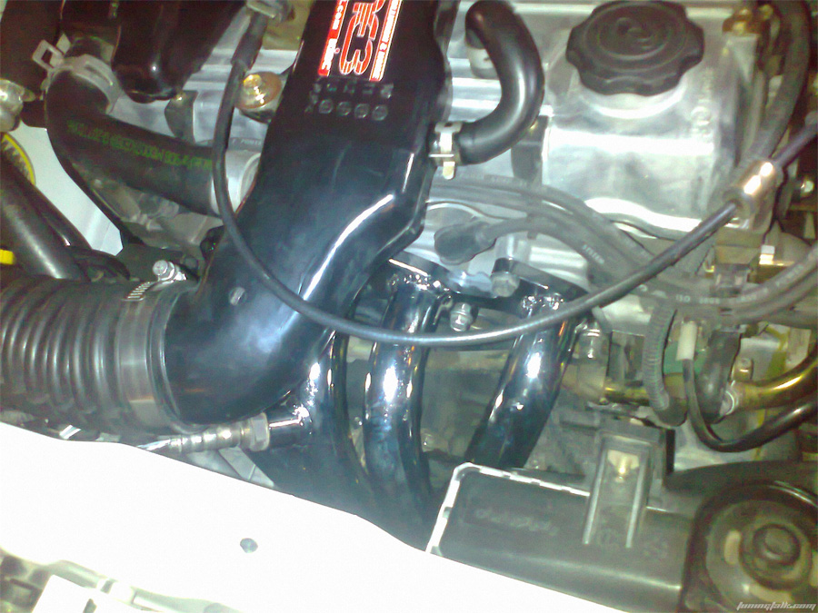 هدرز انجین آرتز برای موتور استاندارد پراید